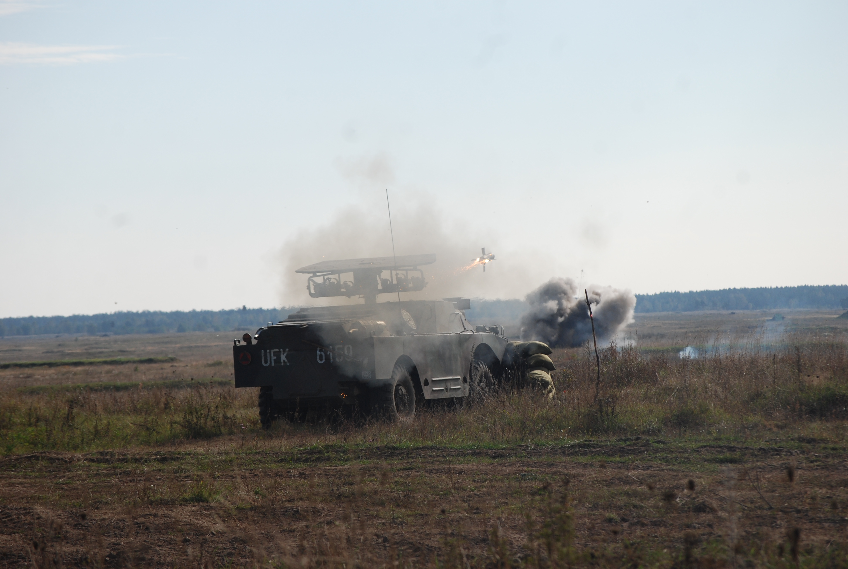 9P133 Podczas strzelania z ppk malutka 2014